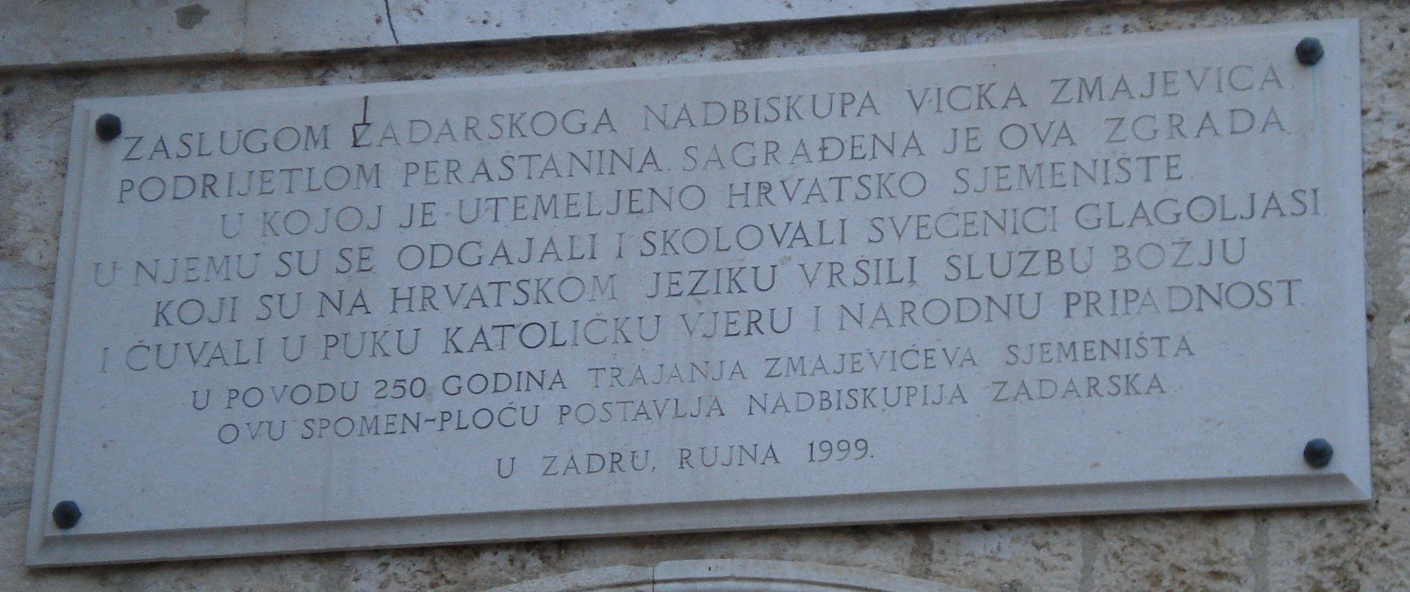 Vicko Zmajević